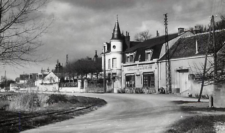 Ancienne commune de Vallières devenue quartier de Fondettes. Panorama urbain et paysager.